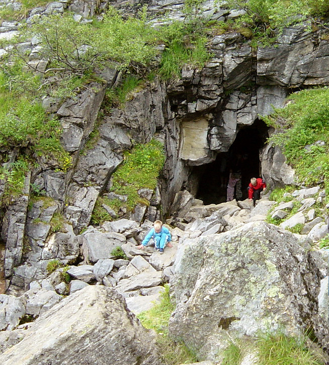 Trollkirka in Norway